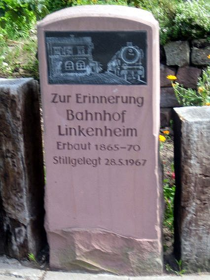 Gedenkstein an den alten Bahnhof Linkenheim, selbst fotografiert 18:34, 8. Aug 2005 Antifaschist 666 1704 x 2272 (910649 Byte) (Gedenkstein an den alten Bahnhof Linkenheim, selbst fotografiert)